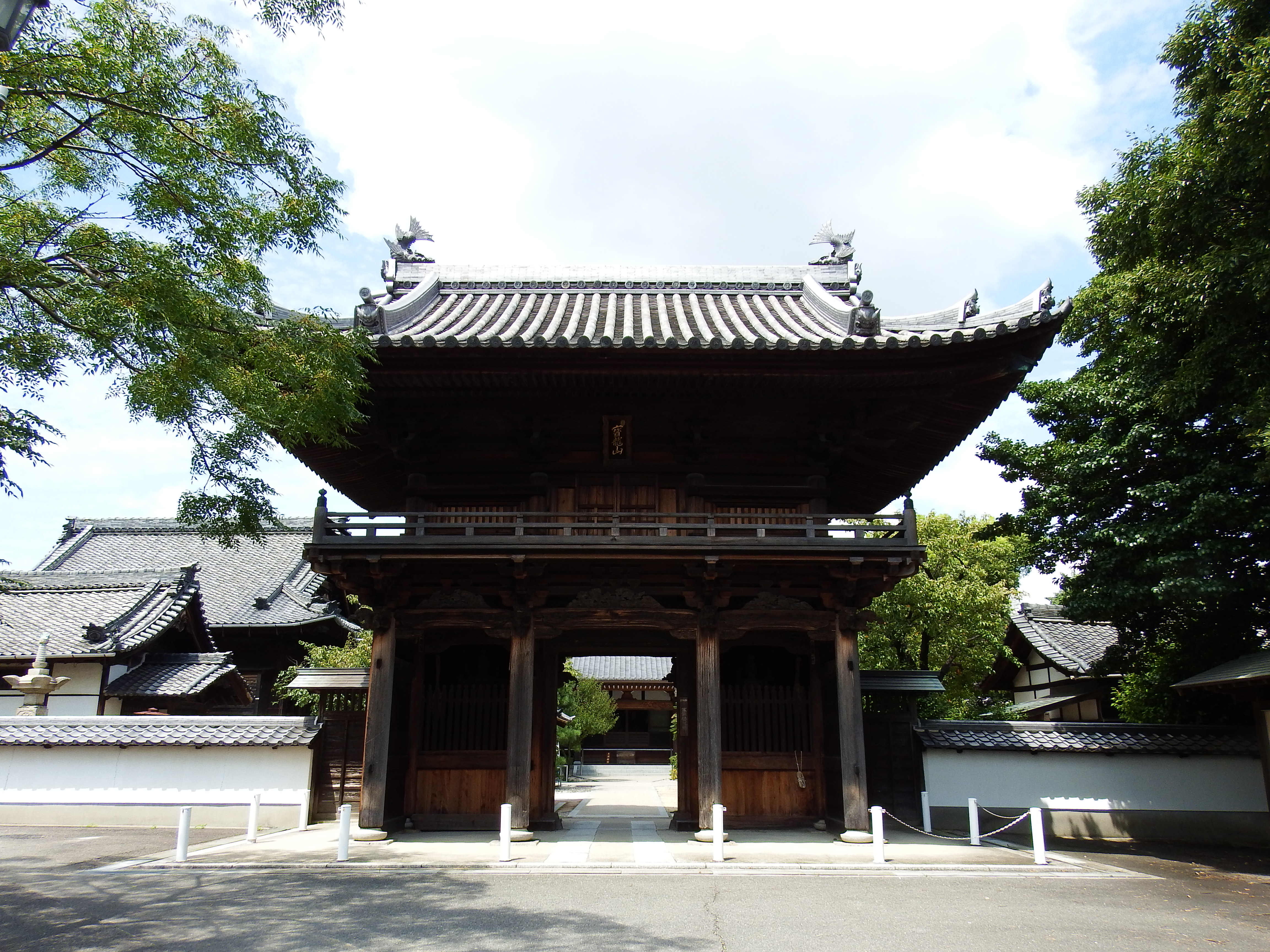 延命寺楼門